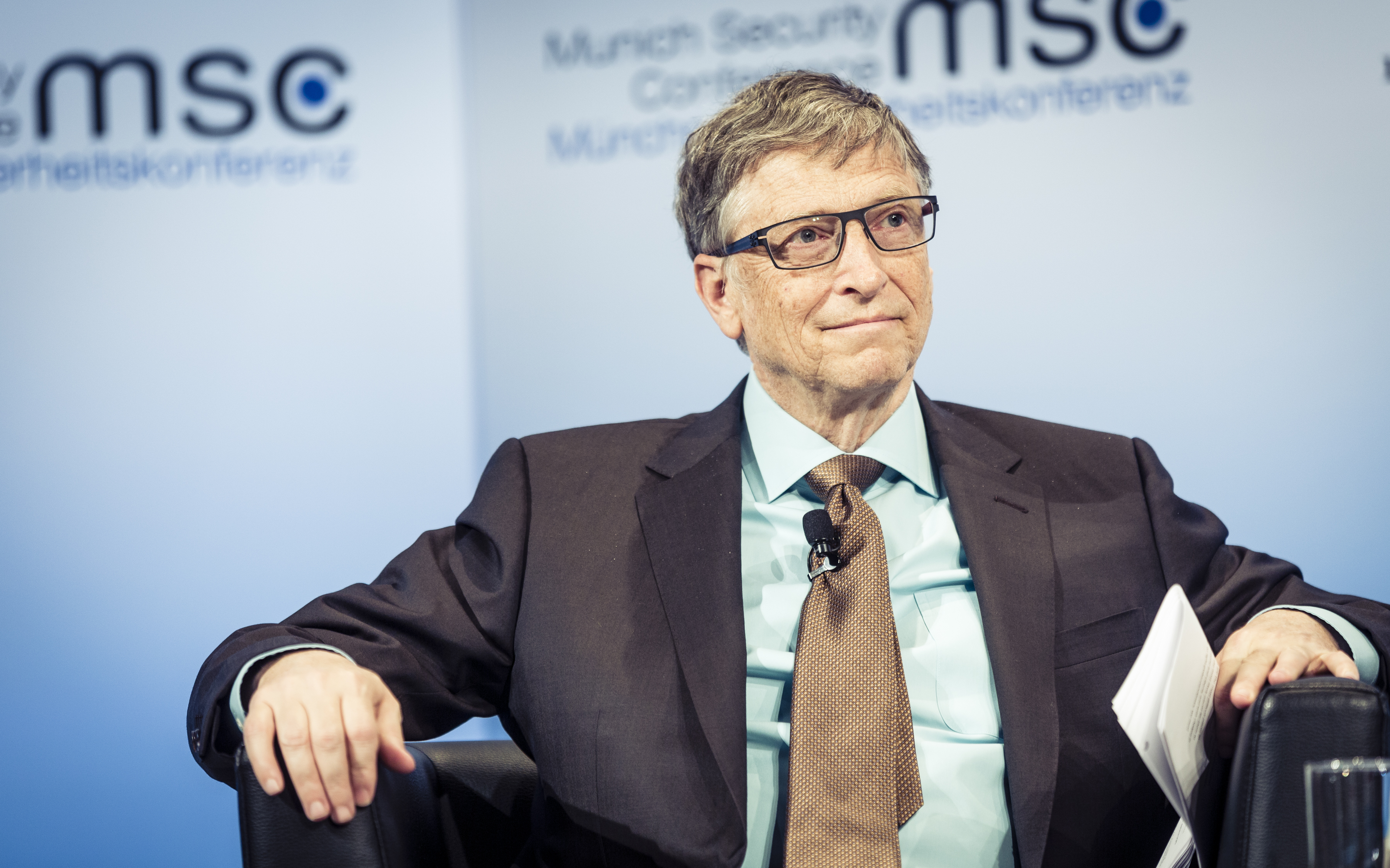 Bill Gates während der Münchner Sicherheitskonferenz 2017